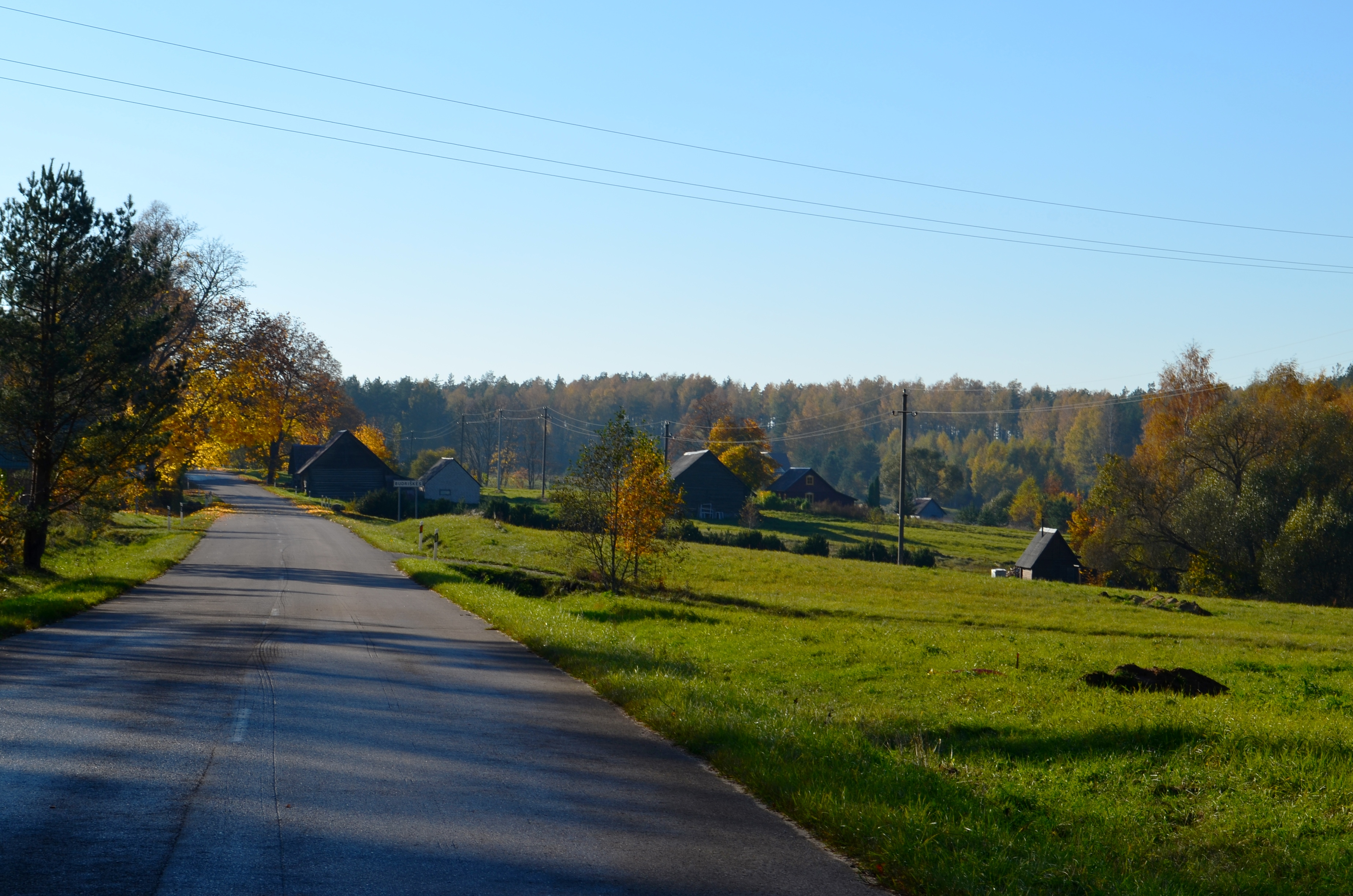 Budriškės, Molėtų raj.